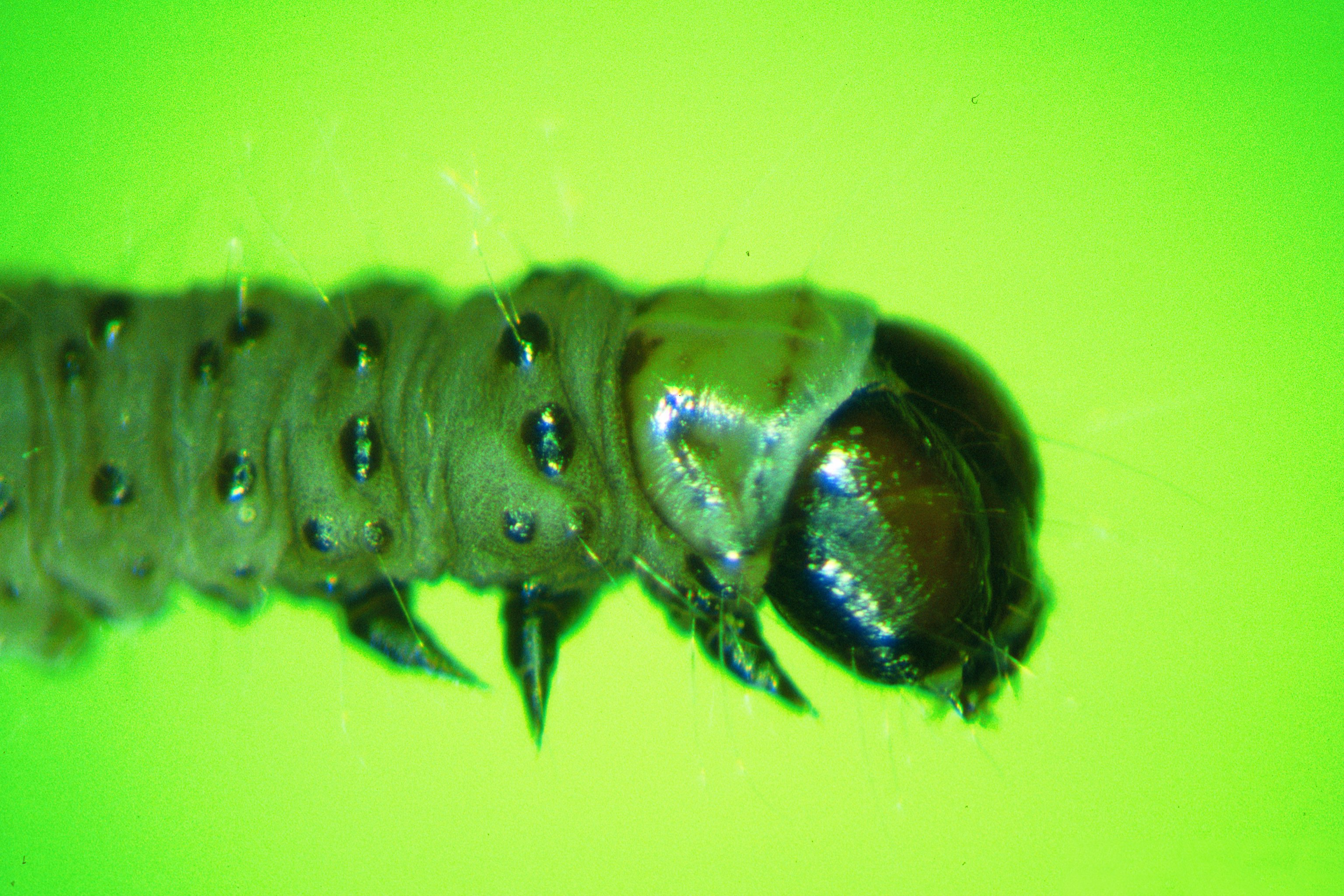 Tortrix viridana larva